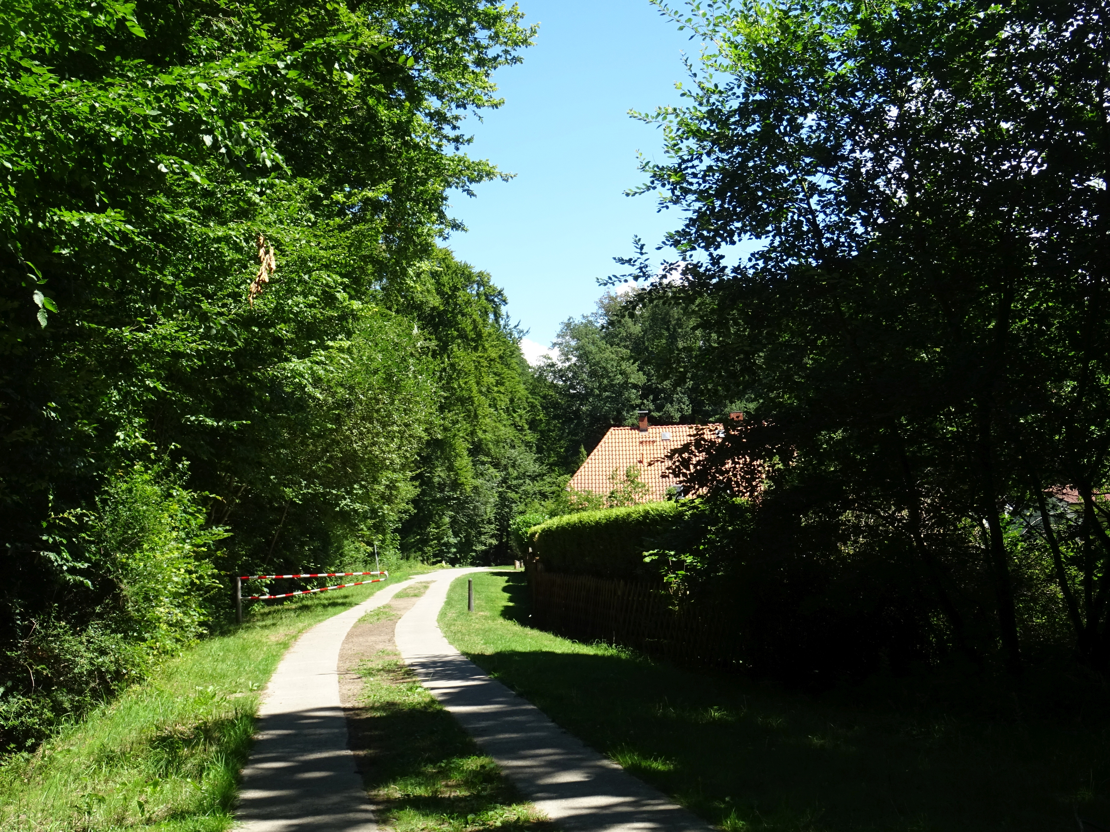 Waldgebiet Mönkweden mit Forsthaus